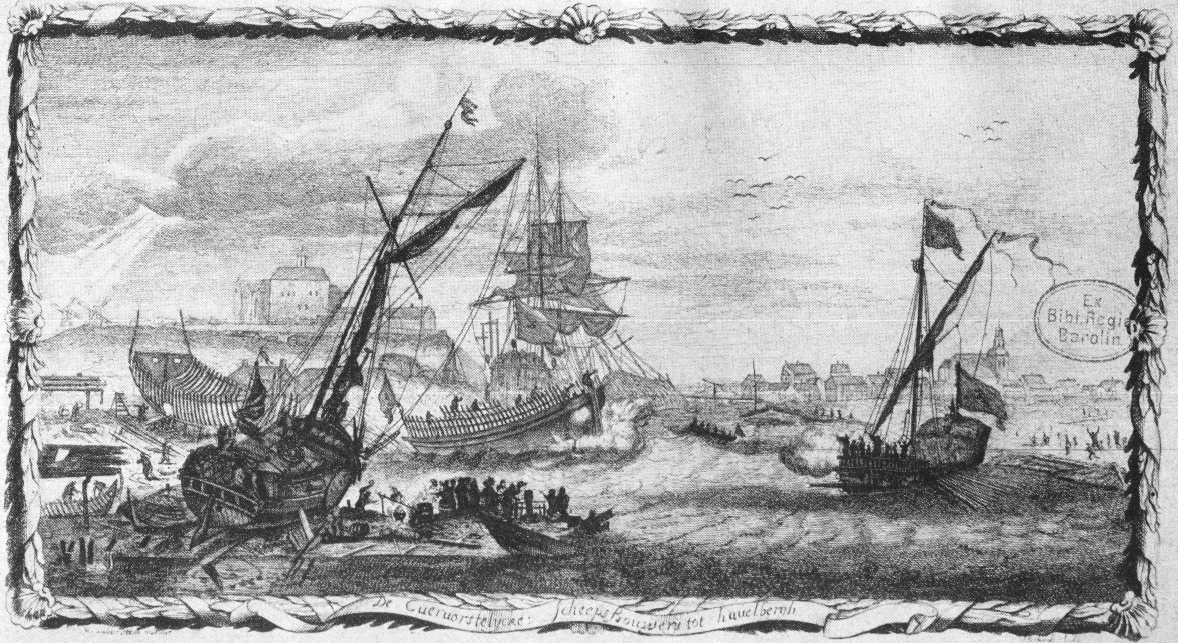 Bildunterschrift in der Brandenburgia: „Kurf. Werft Havelberg. Stich von Oldenbourg nach Ölbild von Madderstegh.“ Bilderunterschrift auf dem Stich: „De Cueruorstelycke ScheepsBouwery tot hauelbergh“